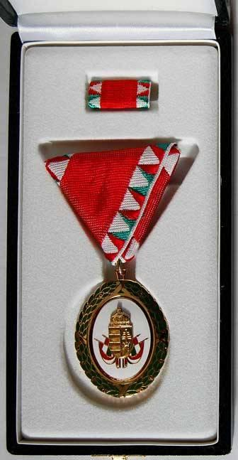 Szolgálati Érdemjel aranyfokozata